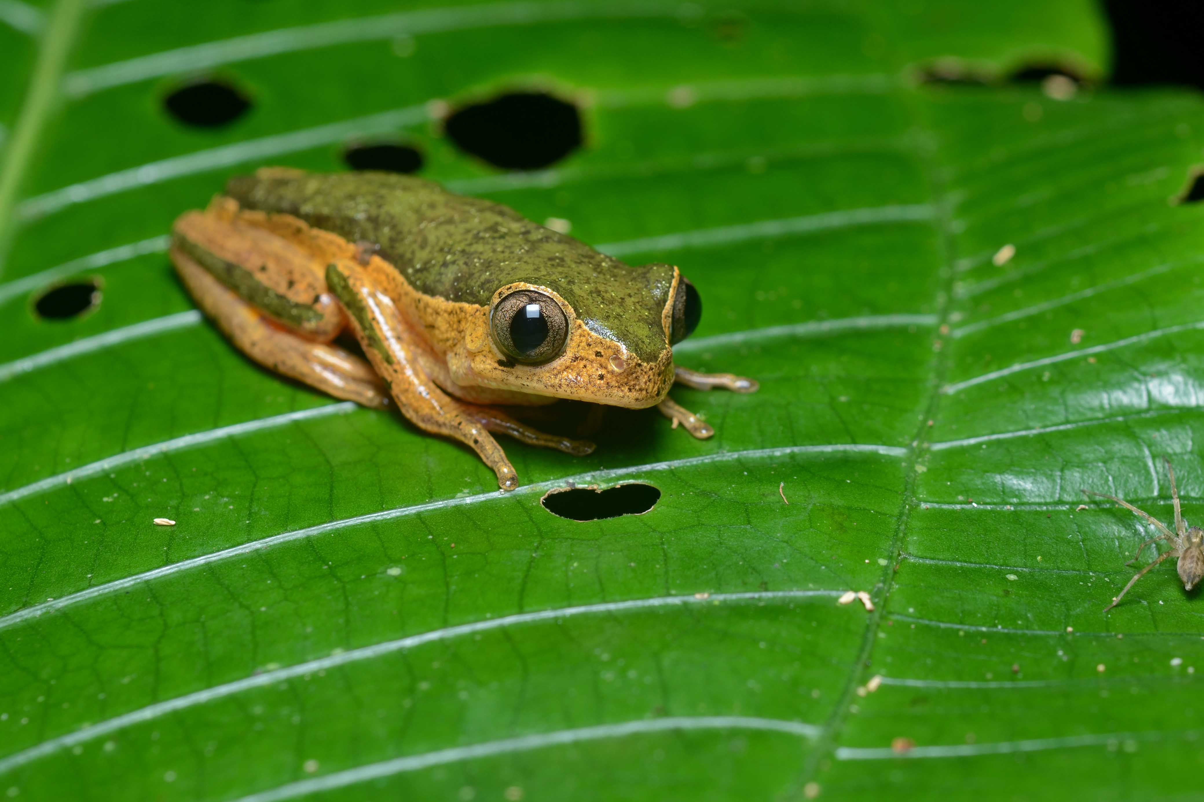 Hylidae: Phyllomedusa palliata Tambopata National Reserve